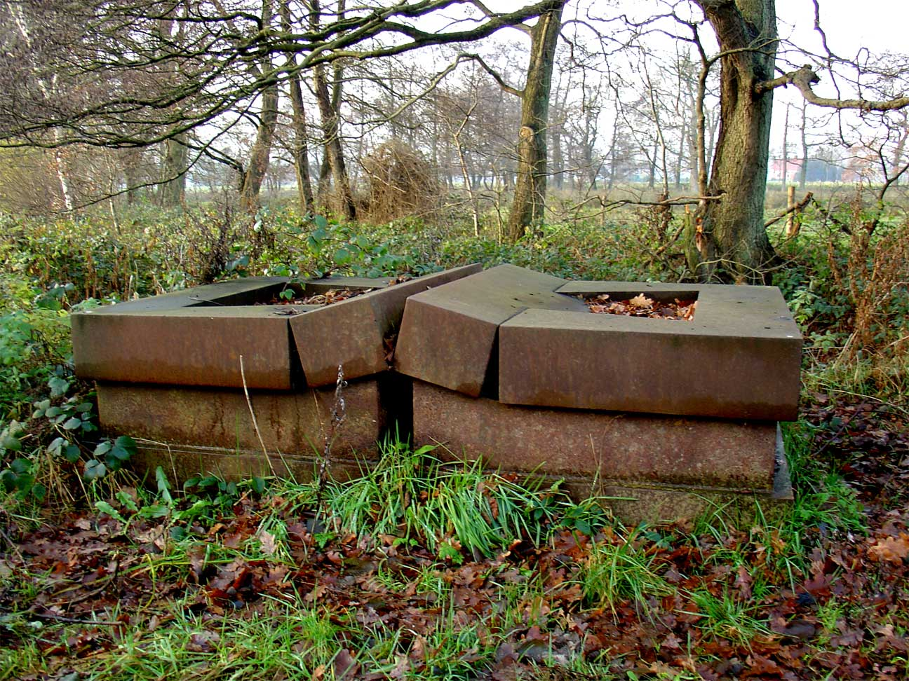 Pick-k-nicktafel door Chris Verbeek in Smeerling nabij Onstwedde